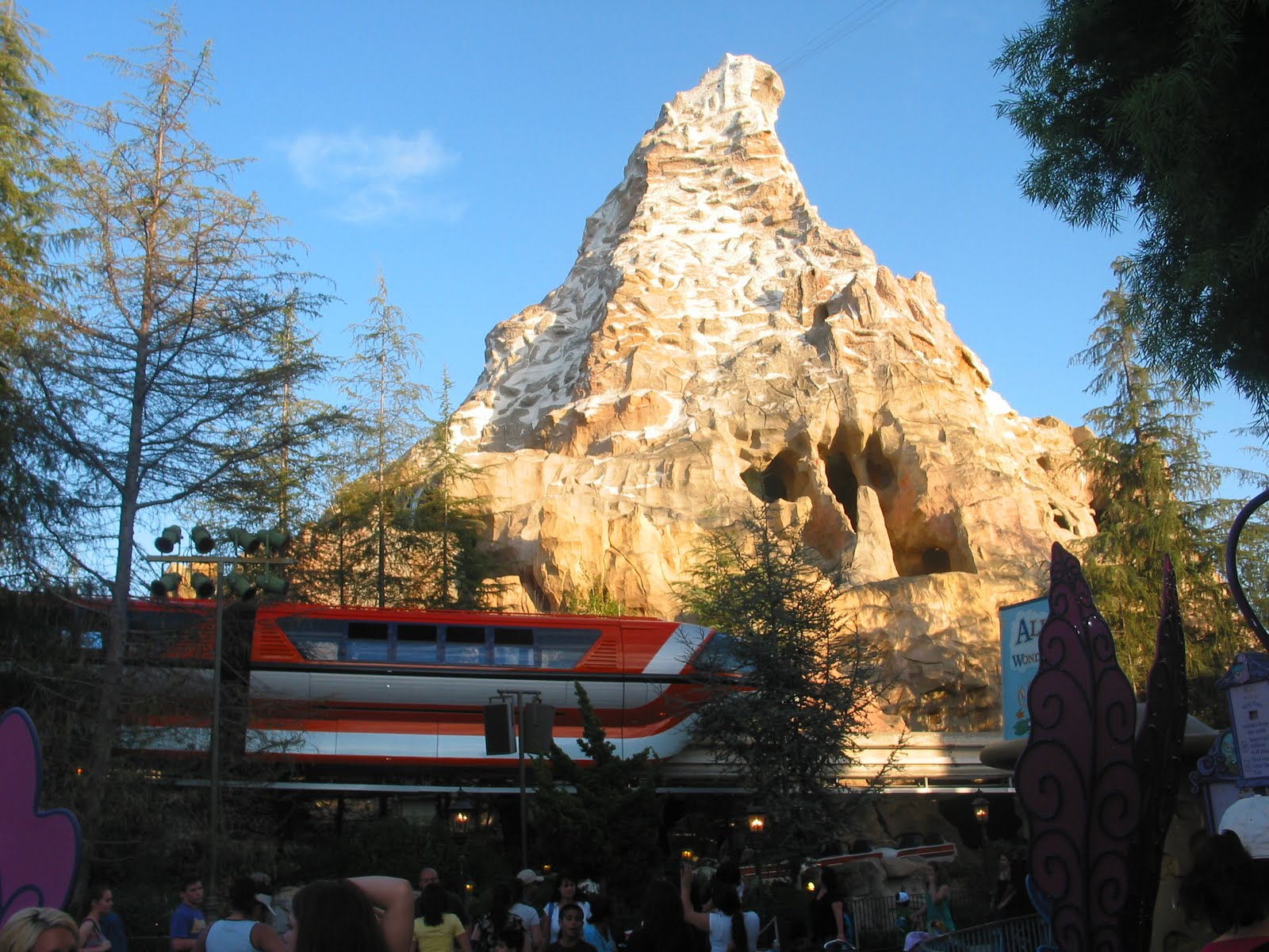 Matterhorn Bobsled ride